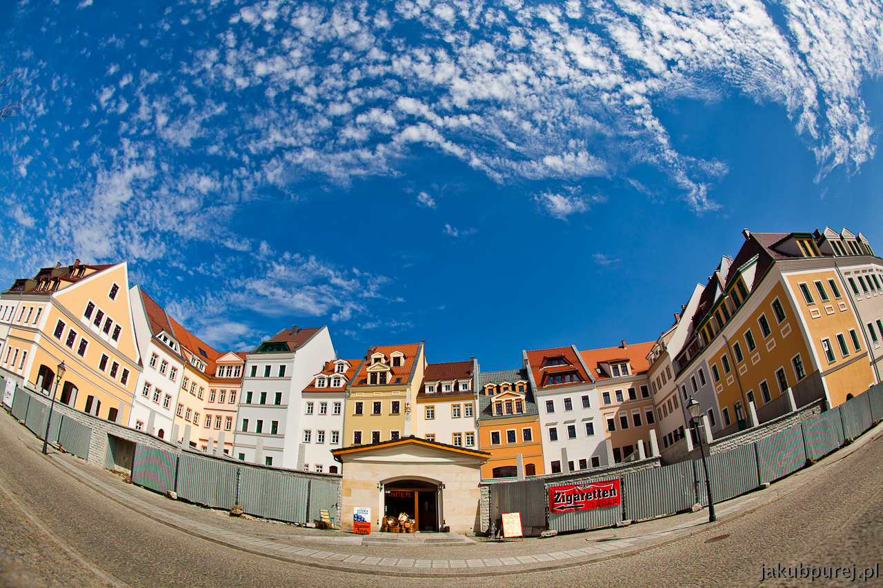 Kwiecień 2013